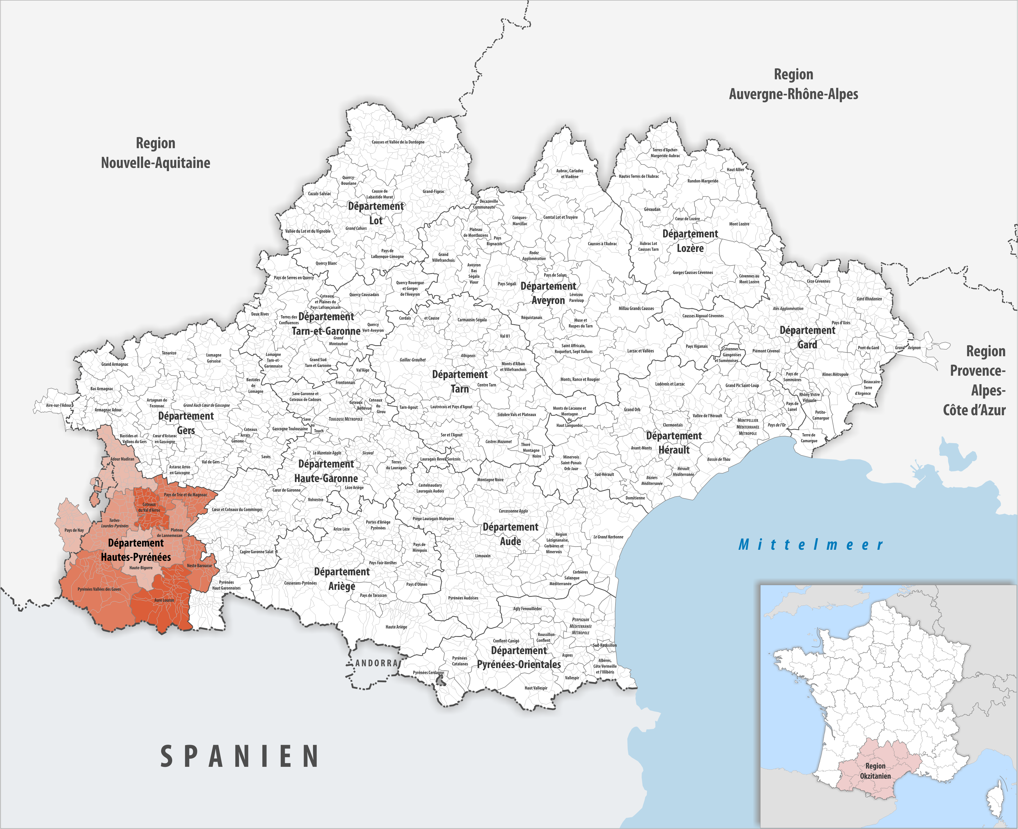 Gemeindeverbände im Département Hautes-Pyrénées